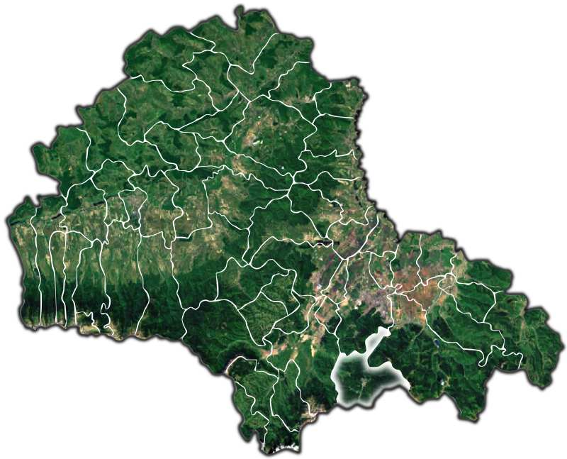 Predeal jud Brasov.